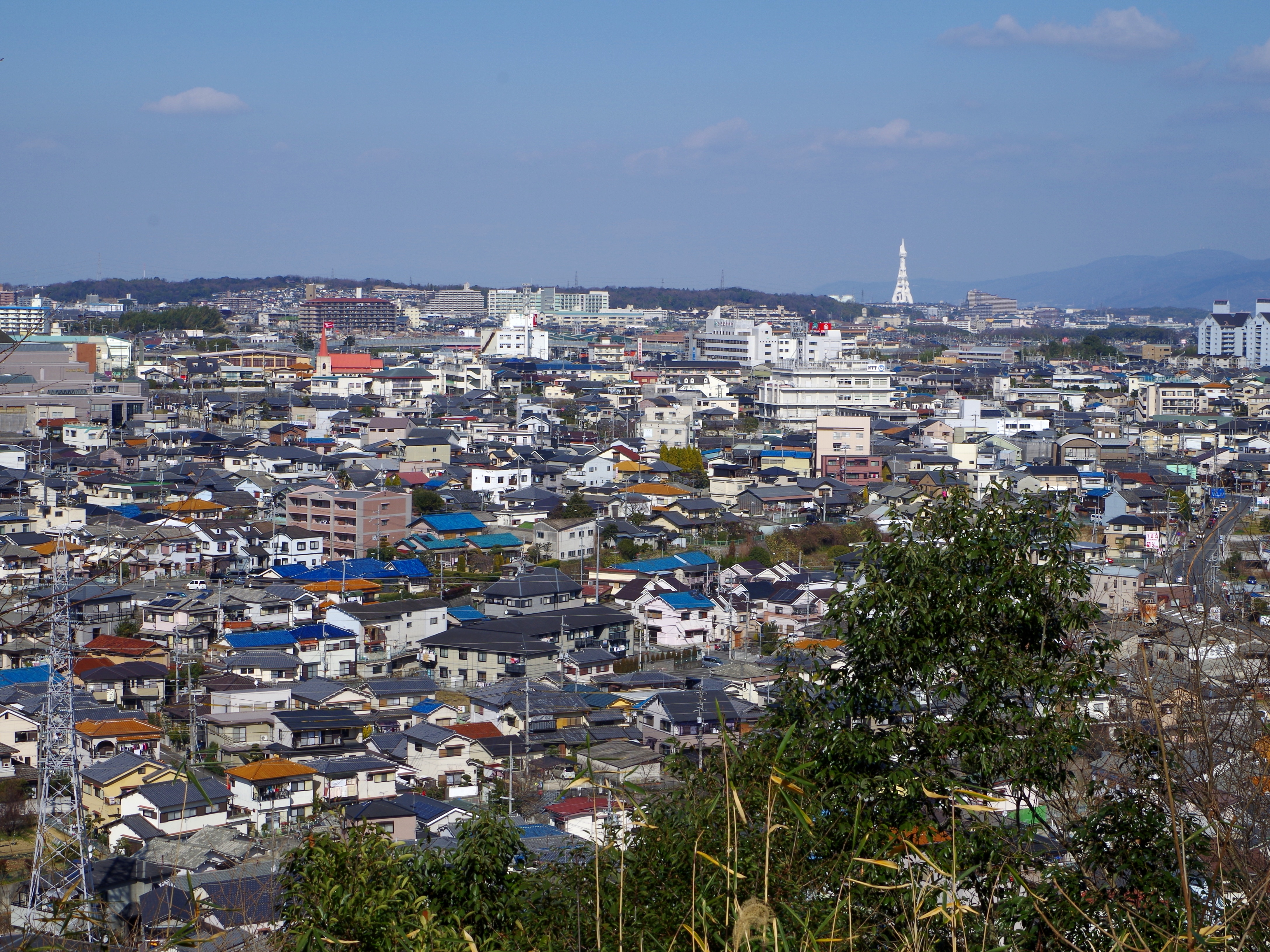 烏帽子形公園古墳広場展望台から河内長野市街を望む 2013.2.10